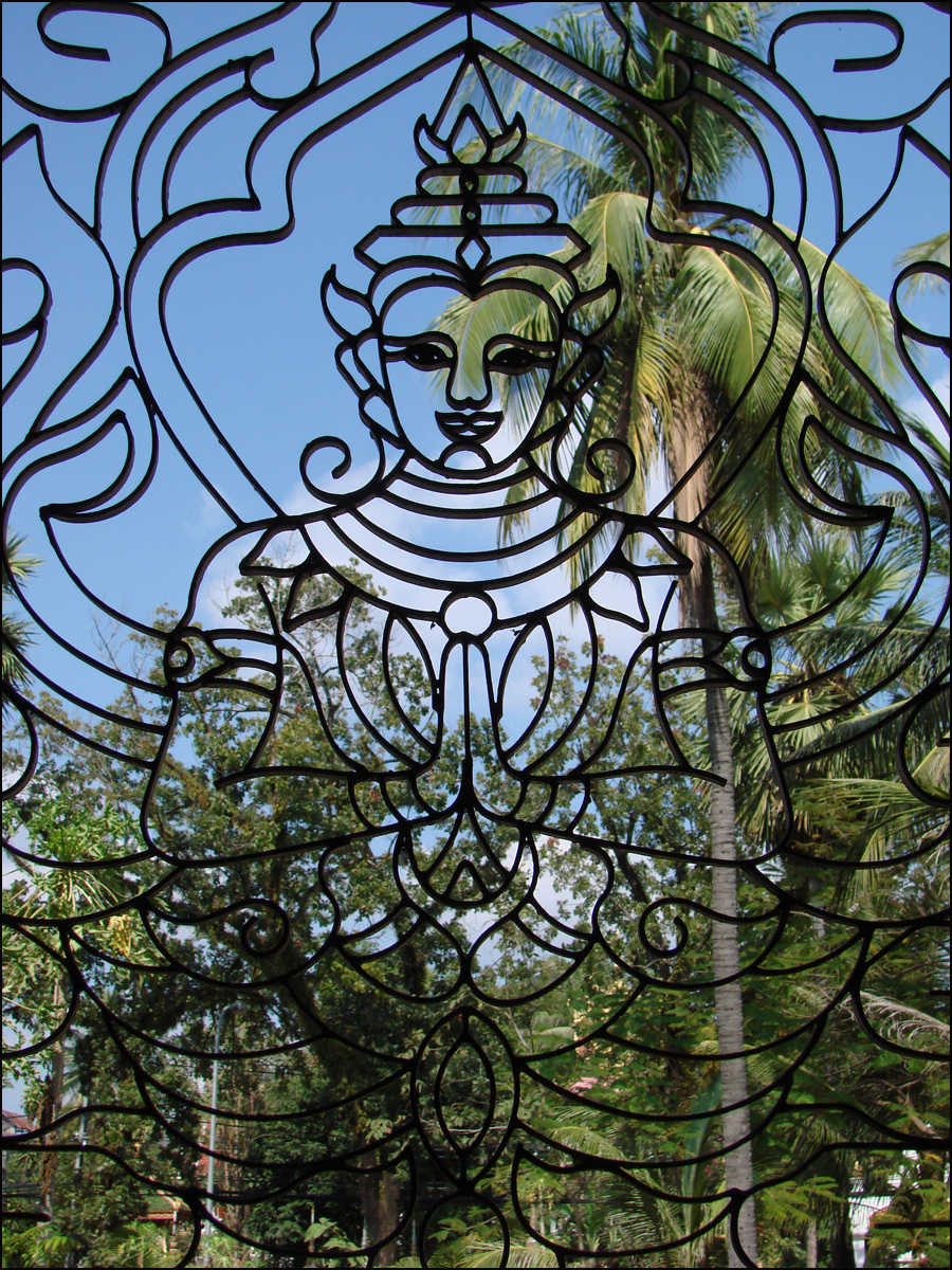 Le Vat Ong Theu est appelé également Pagode du Bouddha lourd. Il a été initialement construit au 16ème siècle par le roi Setthathirat, celui qui a construit le Grand Stupa (That Luang). La pagode a été détruite lors de l'invasion siamoise de 1828 puis reconstruite au 19ème siècle. Ce monastère est la résidence du Patriarche Suprême du Laos